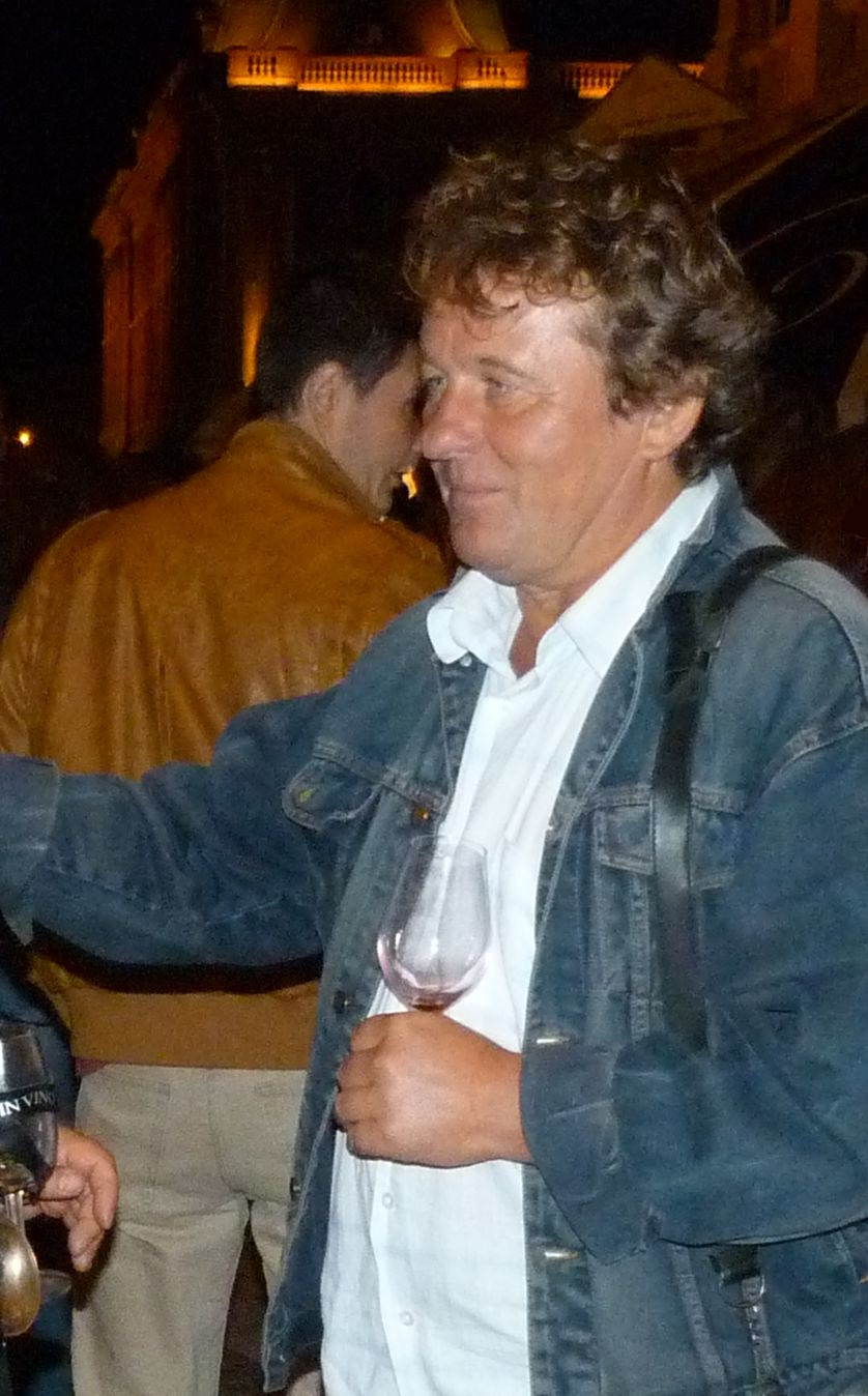 A felvételek Budapesten, a Budai Várban készültek 2012. szeptember 15 –én, szombaton. A 21. Budavári Borfesztiválon, a szüreti felvonuláson felvonultak a Borrendek is. Szarvas József. Források: aborfesztival.hu, Magyar Szőlő Megjelent Creative Commons alatt a Metapolisz sorozatban. A Metapolisz sorozat valamennyi képe Creative Commons alatti valamin kereskedelmi - for profit - célra is felhasználható.